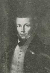 Václav Bojer (1795 - 1856), Český botanik a cestovatel.